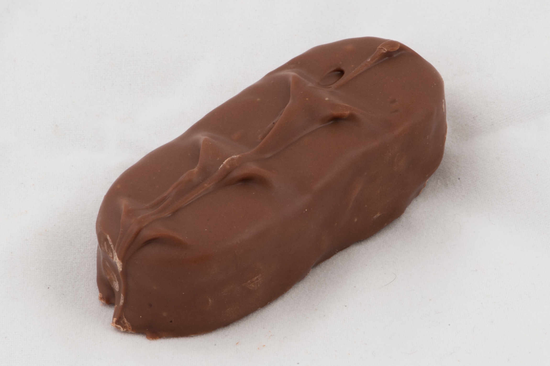 Bounty